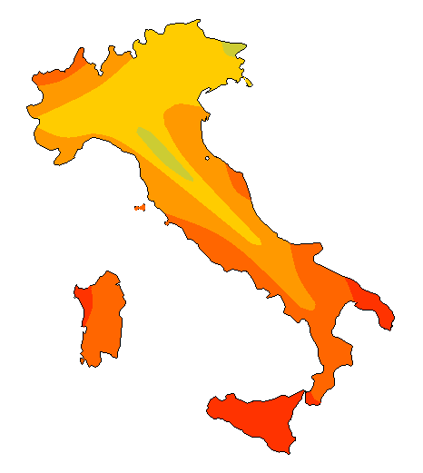 Carta della radiazione solare globale in Italia in agosto 24 MJ/mq